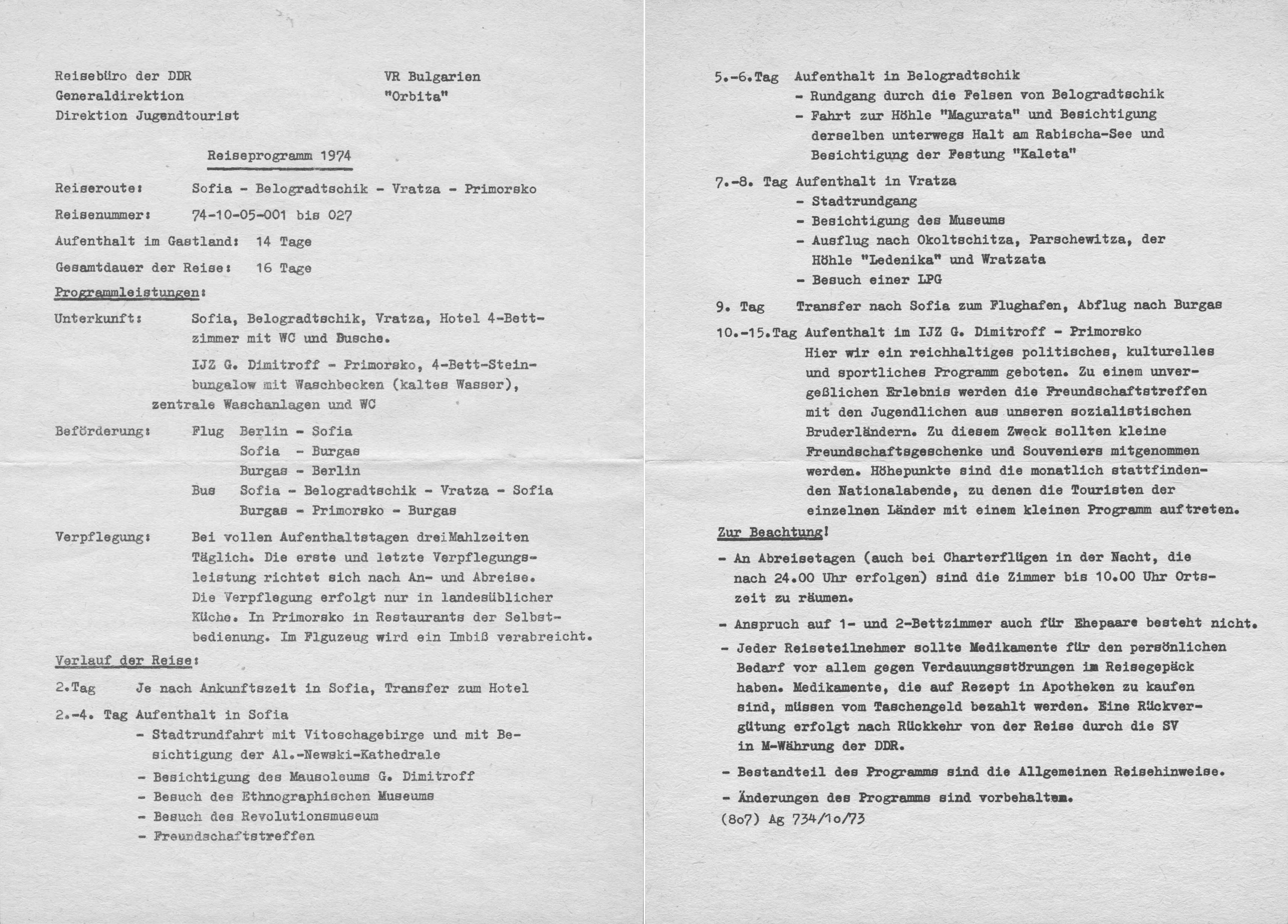 Das Reiseprogramm einer Jugendtouristreise nach Bulgarien mit der Reiseroute Sofia-Belogradtschik-Vratza-Primorsko im Jahr 1974